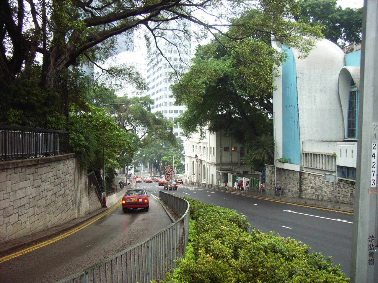 上亞釐畢道落花園道